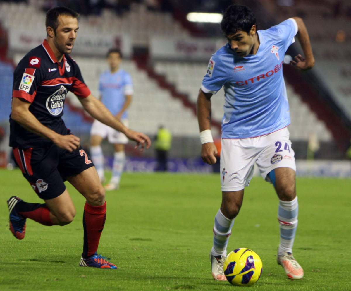 Unha xogada do partido Celta-Deportivo na tempada 2012-2013 o 27 de outubro.